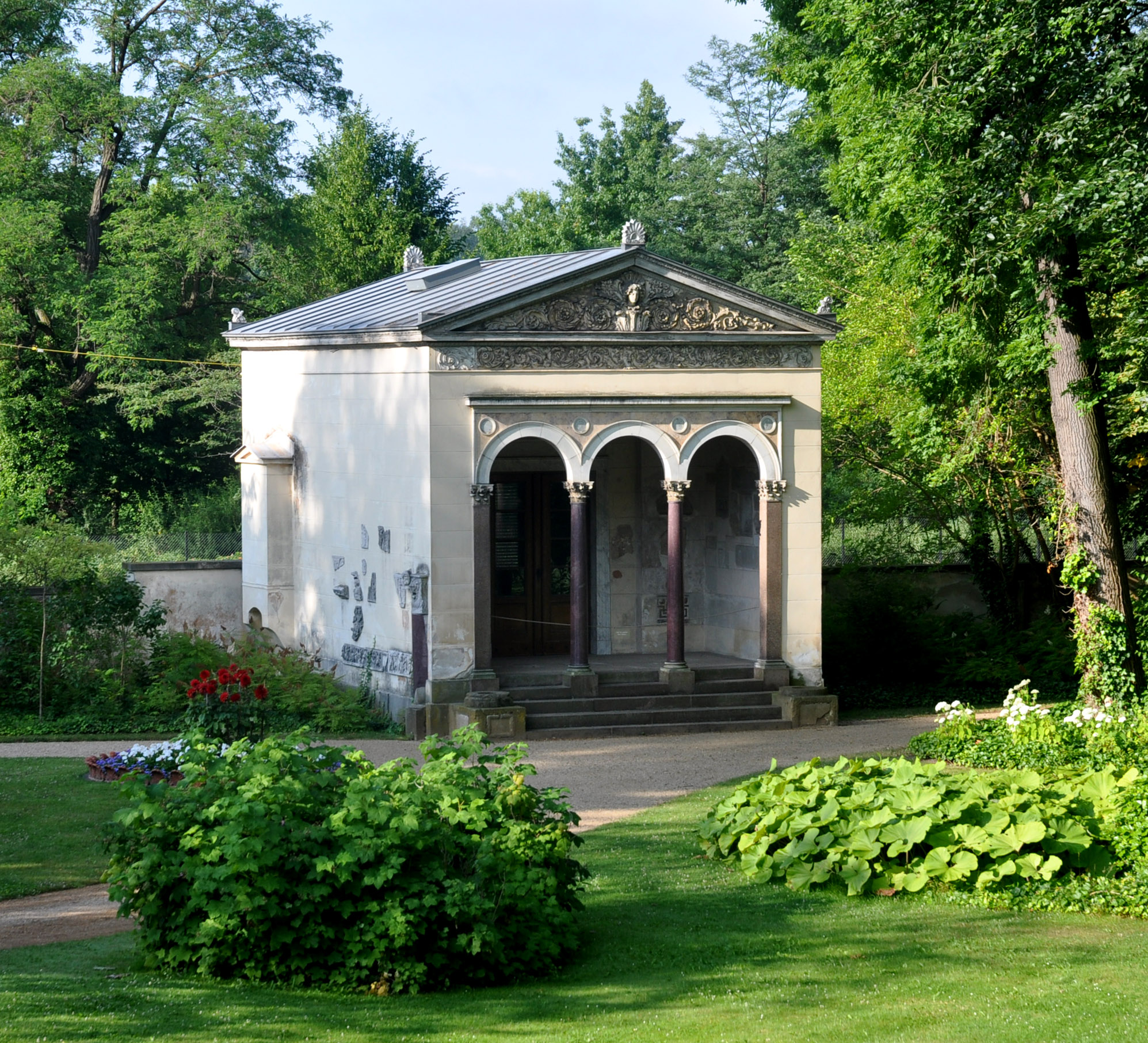 Gartenseite der Neugierde von der Adjutantenlaube